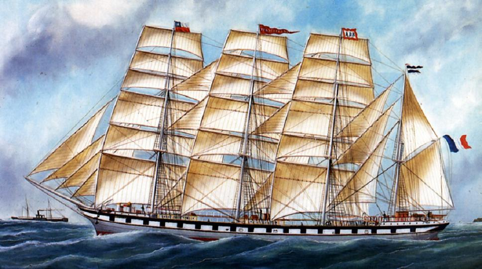 Le quatre-mâts barque Persévèrance de l'Armement Bordes (1896)